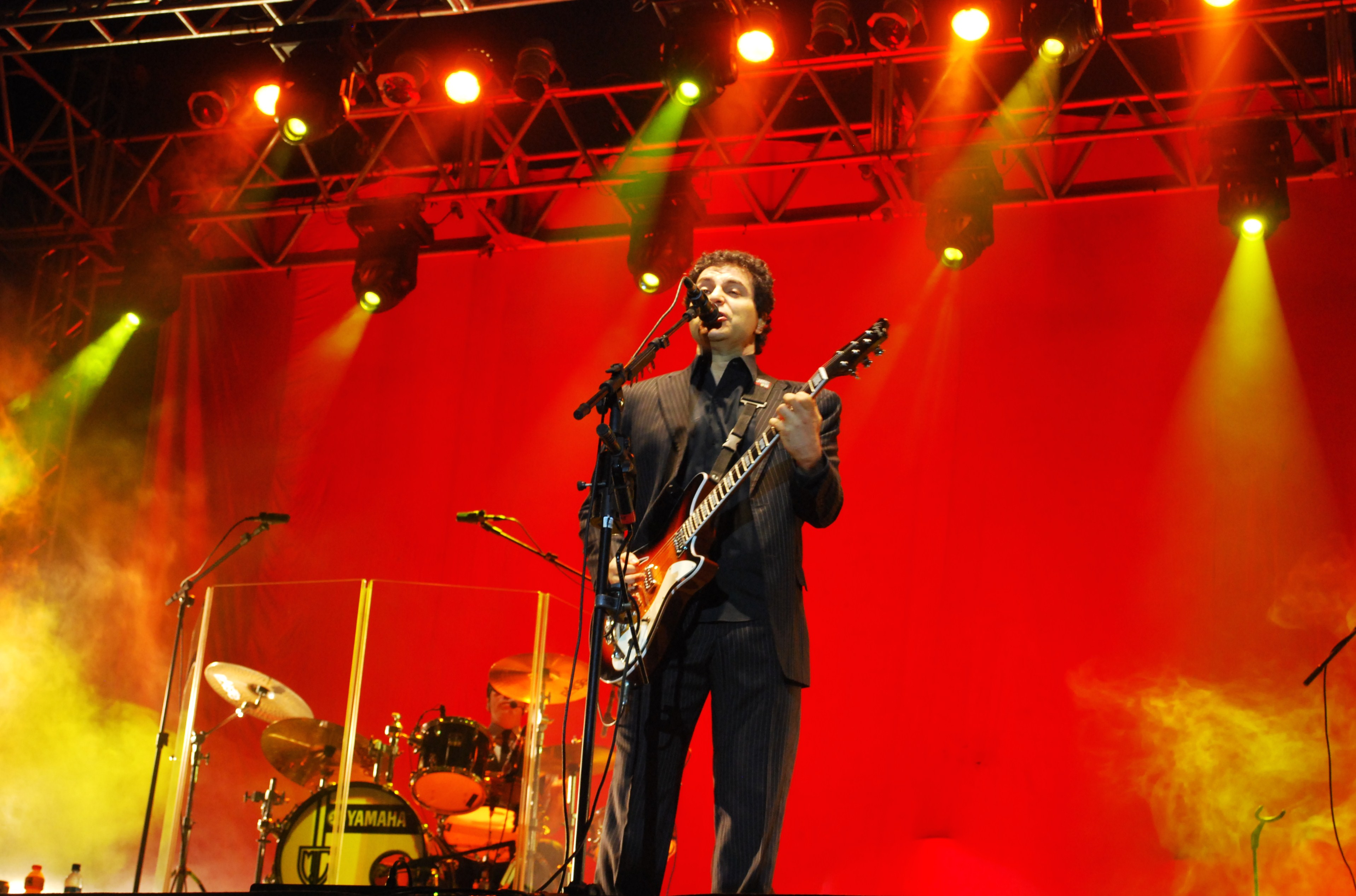 Frejat em uma apresentação no festival Mossoró Mix em 2009.